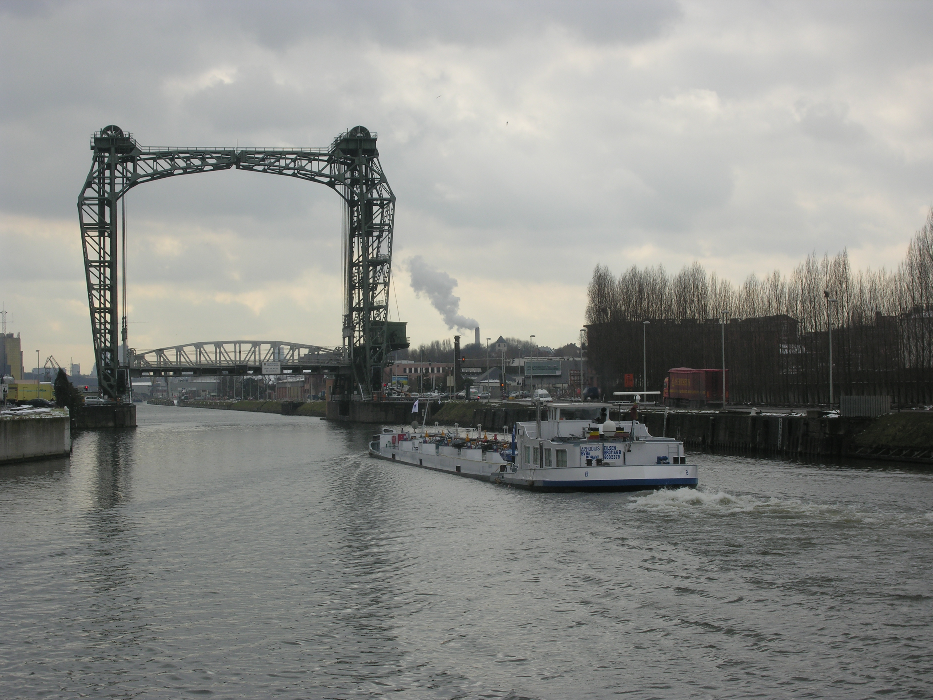 Buda bridge, Brussels, Belgium